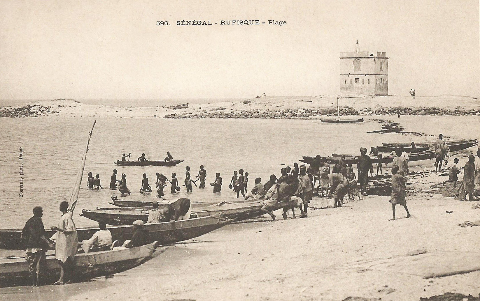 François-Edmond Fortier, Sénégal. Rufisque. Plage. Afrique Occidentale - Sénégal.